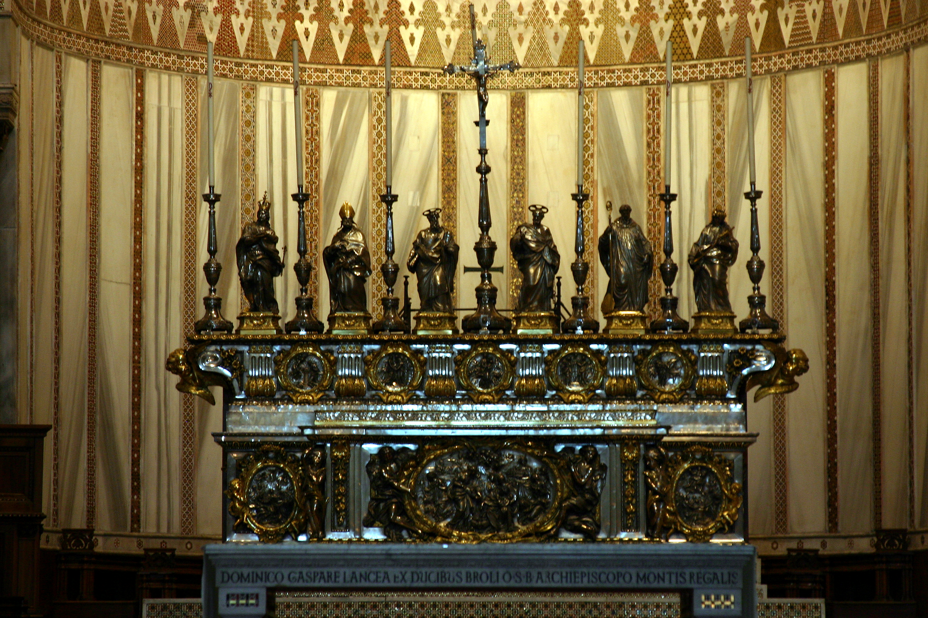 Cathedral of Monreale